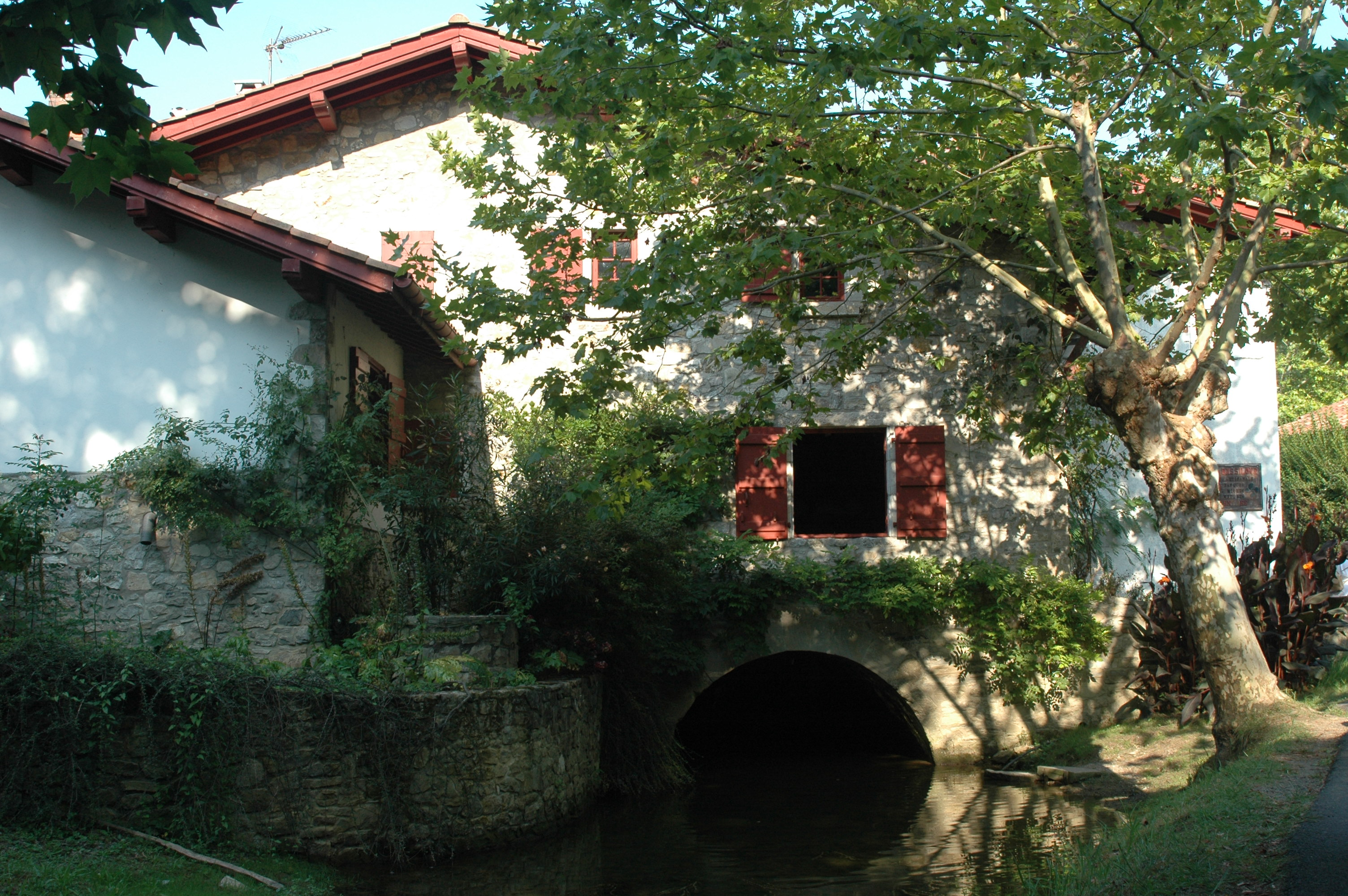 Bidart, le moulin de Bassilour (construit en 1741) sur l'Uhabia. Photo prise le 07/08/06 par Harrieta171